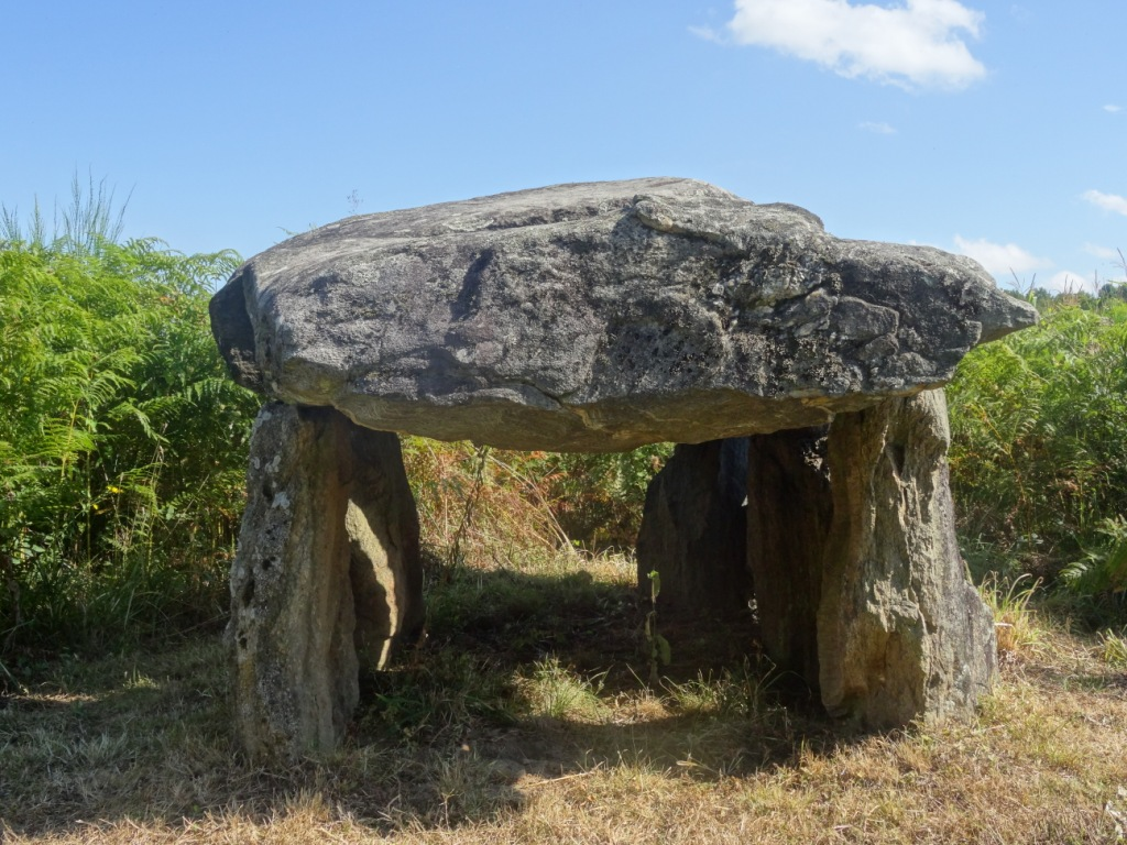 Dolmen de La Croix-du-Breuil